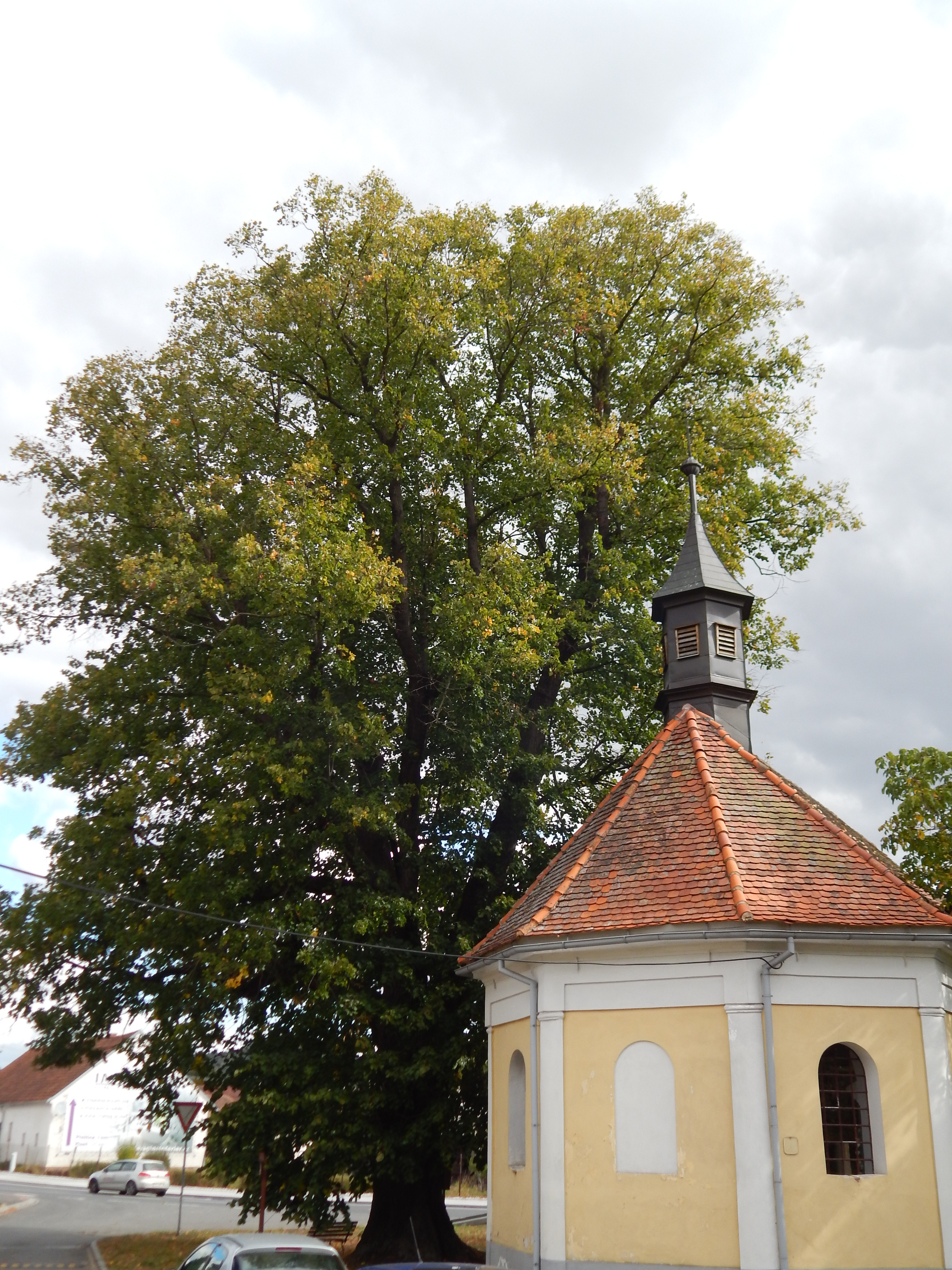 Borovy u kapličky, okres Klatovy, Lípa velkolistá